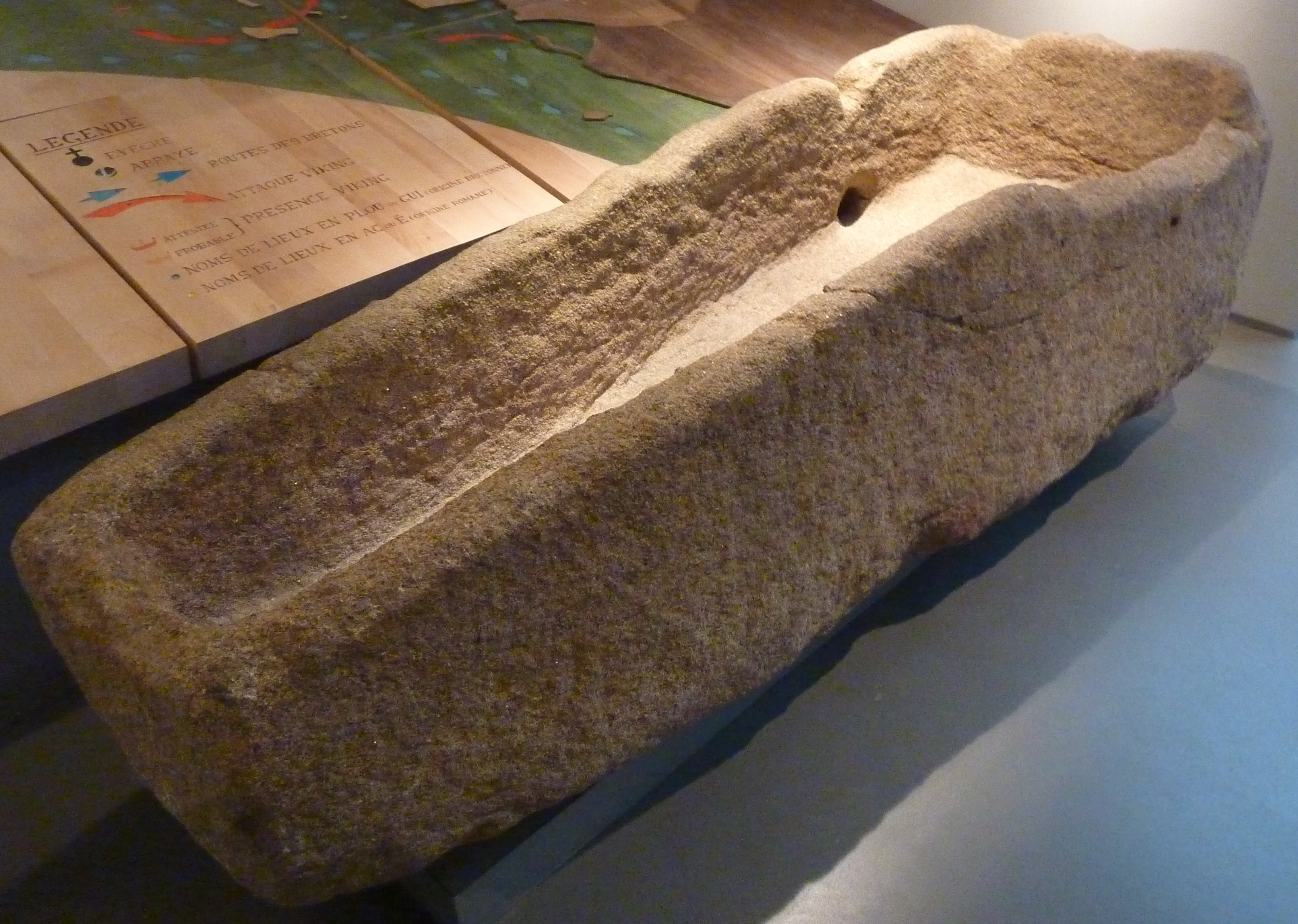 Sarcophage mérovingien dit de saint Budoc, réutilisé comme abreuvoir. Il évoque les auges de pierre grâce auxquelles, selon les légendes, les saints bretons auraient traversé la Manche (en granite taillé, datant du 5e au 8e siècle, trouvé à Dol-de-Bretagne)